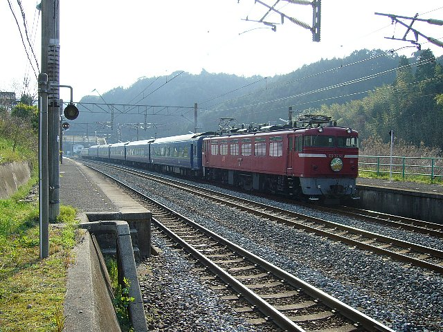 長崎本線現川駅で待避する「あかつき」 ヘッドマークは「なは・あかつき」となっている 2006年3月 Bakkai撮影